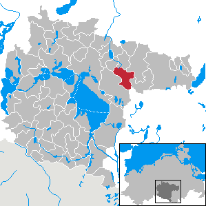 Groß Dratow in Mecklenburg-Western Pomerania - District Müritz